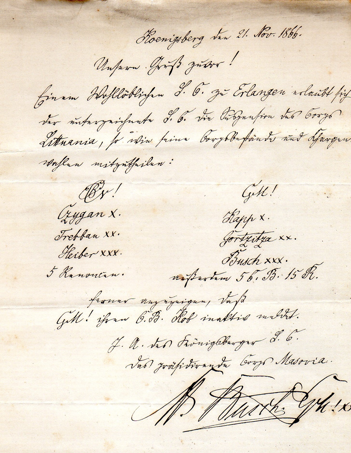 Bestandsmeldung des Königsberger Senioren-Convents an den Vorort Erlangen im Kösener Senioren-Convents-Verband Transkription: Koenigsberg, den 21. Nov. 1866. Unseren Gruß zuvor! Einem Wohllöblichen S.C. zu Erlangen erlaubt sich der unterzeichnete S.C. die Suspension des Corps Litthuania, so wie seine Corpsbestände und Chargen- wahlen mitzuteilen: [Zirkel]_________________[Zirkel - Masovia] Czygan X._____________Kapp X. Trebban XX.____________Gortzitza XX. Heiber XXX.____________Busch XXX. 5 Renoncen___________außerdem 56. B.[urschen] 15 R.[enoncen] ferner anzuzeigen, daß [Zirkel - Masovia] ihren C.B. Kob inaktiv meldet. I.A. des Königsberger S.C. das präsidierende Corps Masovia M. Busch [Zirkel - Masovia]